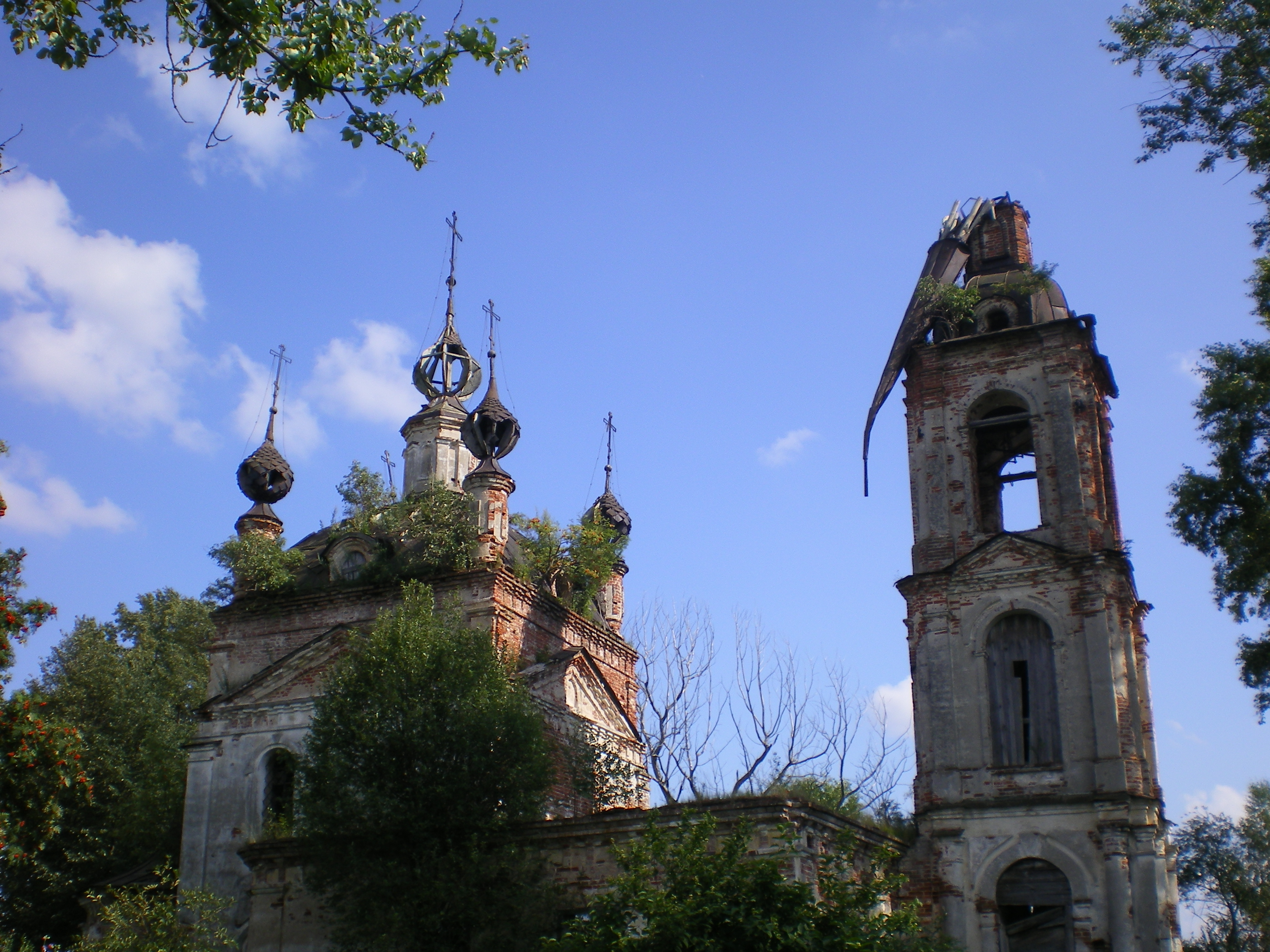 Фото православного храма в селе Котово